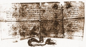 Potvrdenie donácie kráľa Ondreja II. z roku 1231 na žiadosť Beharových synov Dionisia, Petra, Voislaua a Sebastiana kráľom Belom IV. roku 1262.